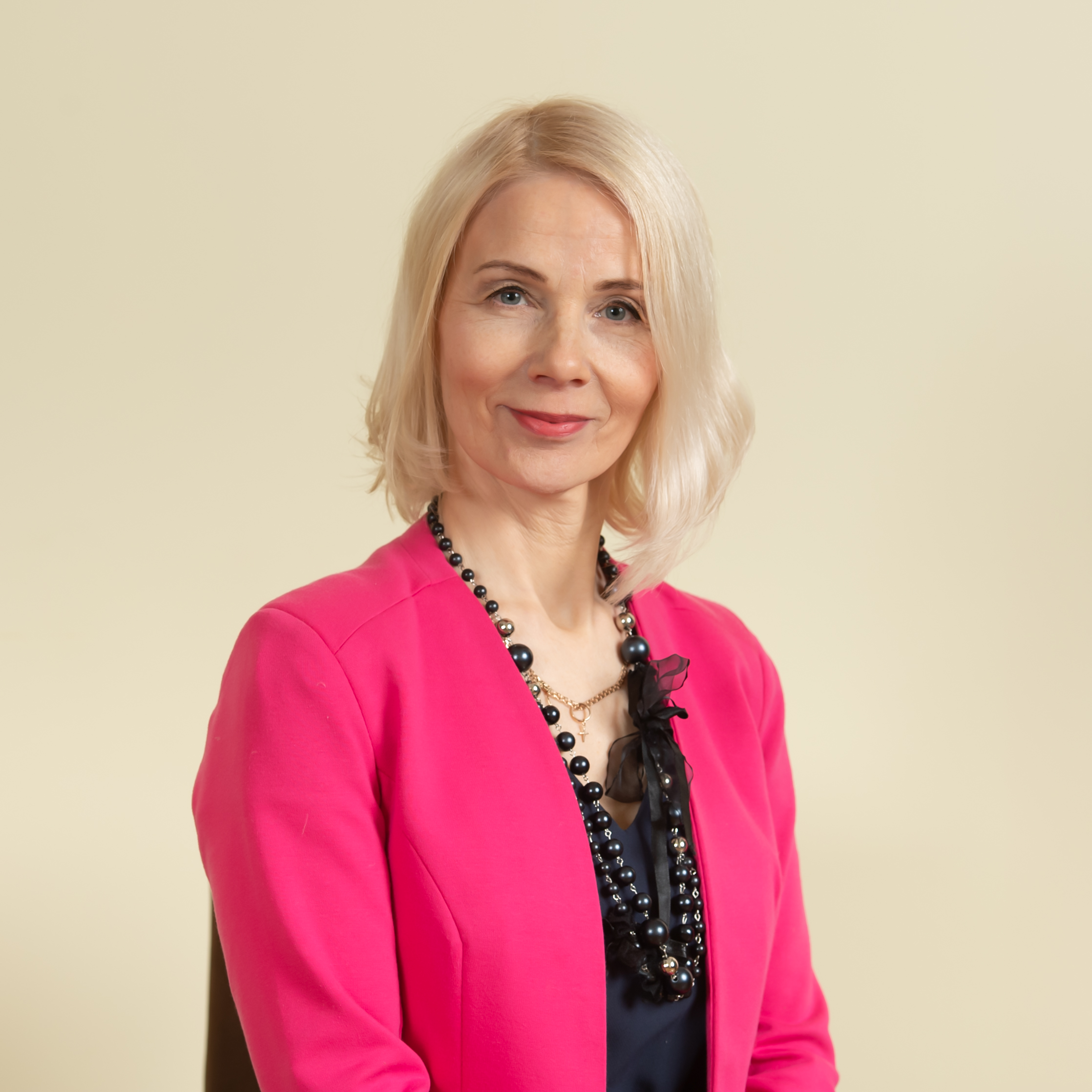 Helle-Moonika Helme